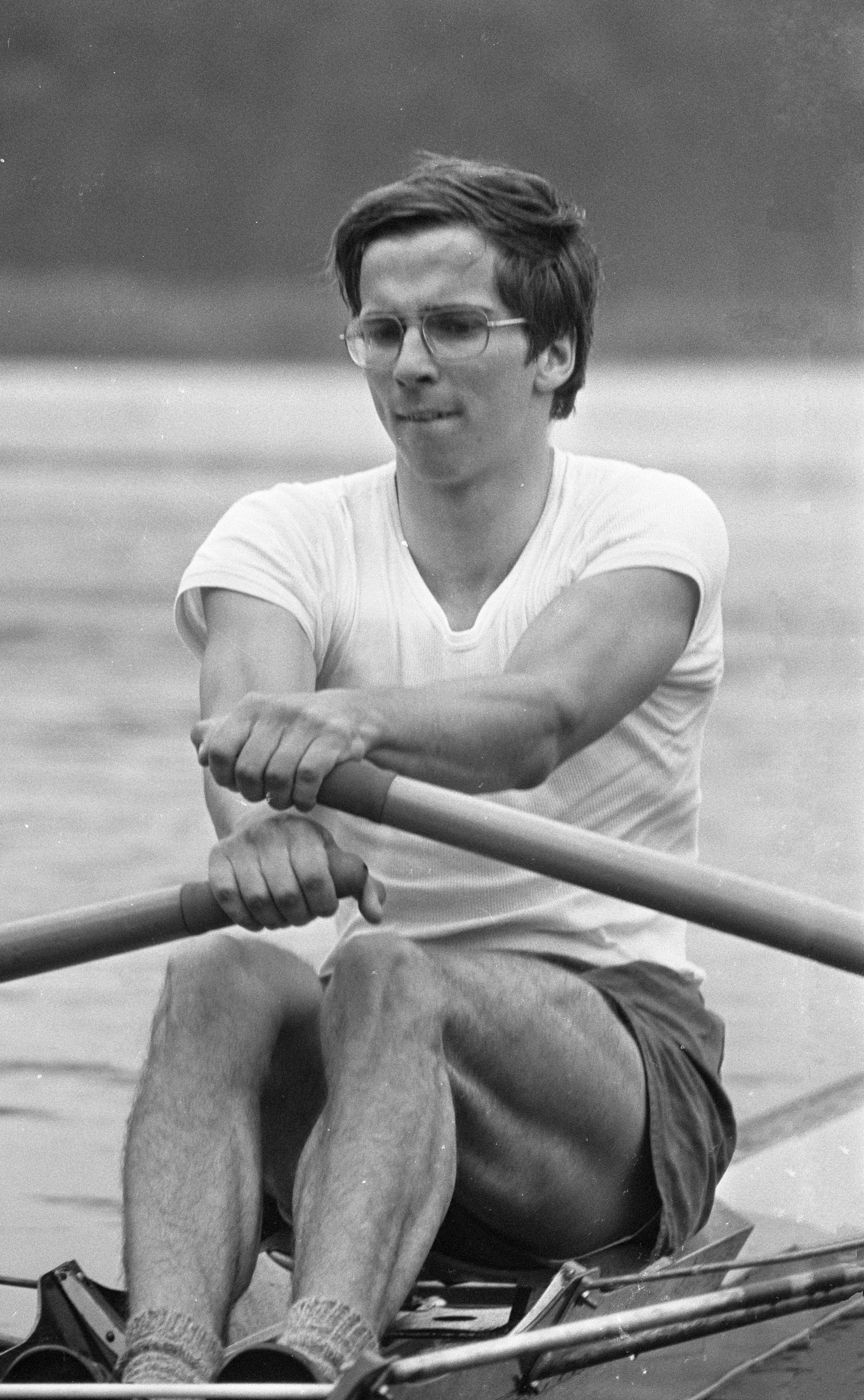 Nationale Roeikampioenschappen op Bosbaan, Jan Bruyn in aktie skif